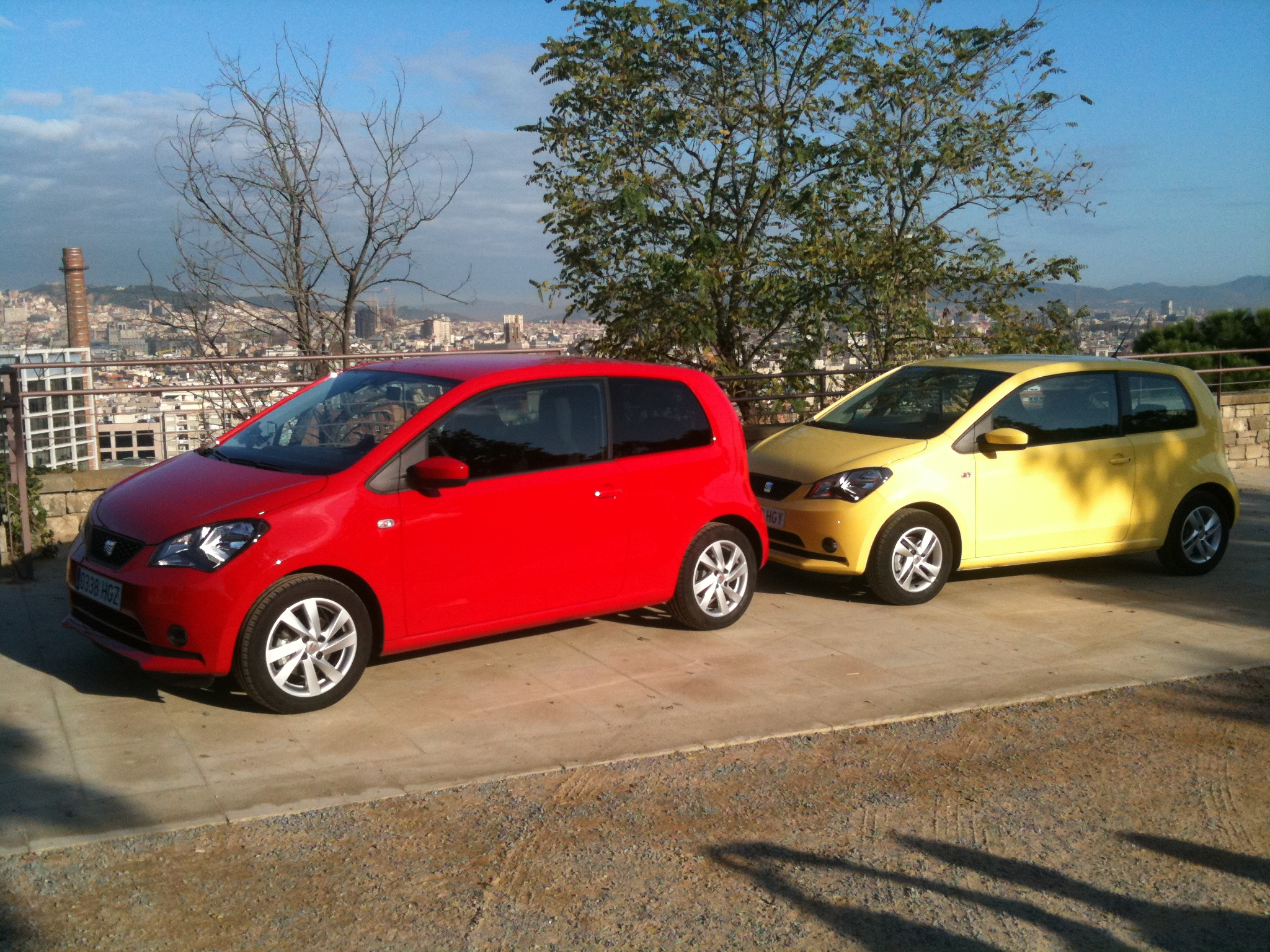 IMG_0718, SEAT Mii in row